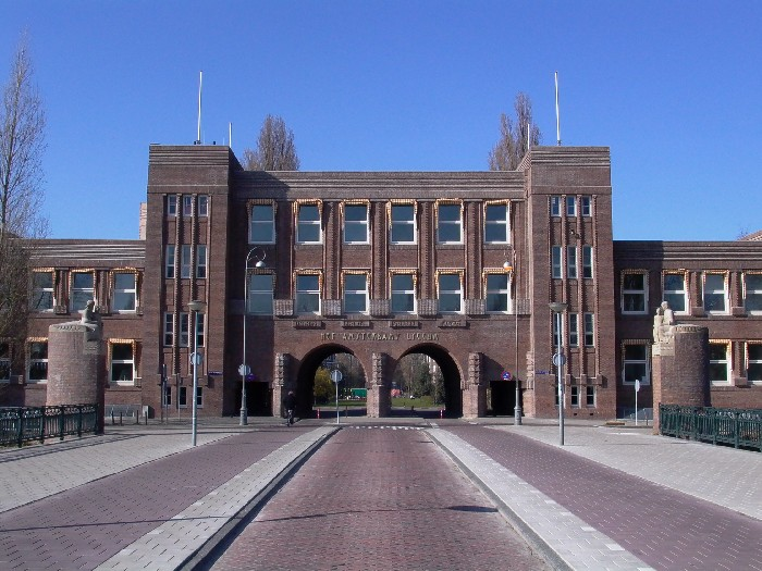 Foto gemaakt door Daniel van der Ree